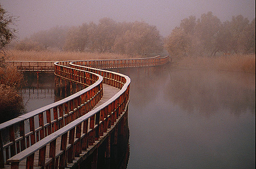 Las tablas de Daimiel